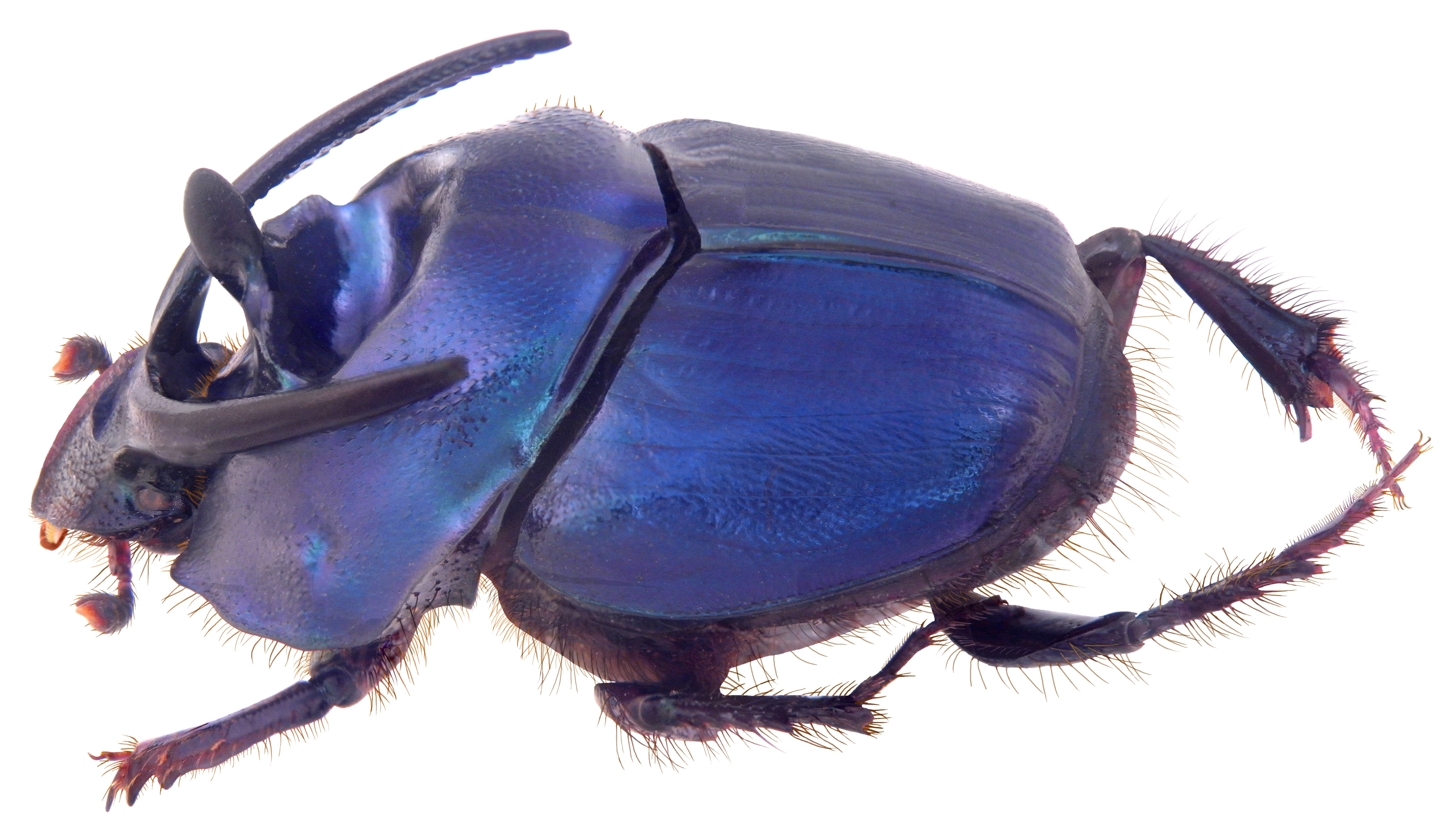 Familie: Scarabaeidae Groesse: 17 mm Fundort: Indonesien, Borneo, Sintang leg. F.Buffat, 1898; det. J.Schönfeld, 2009 Photo: U.Schmidt, 2009